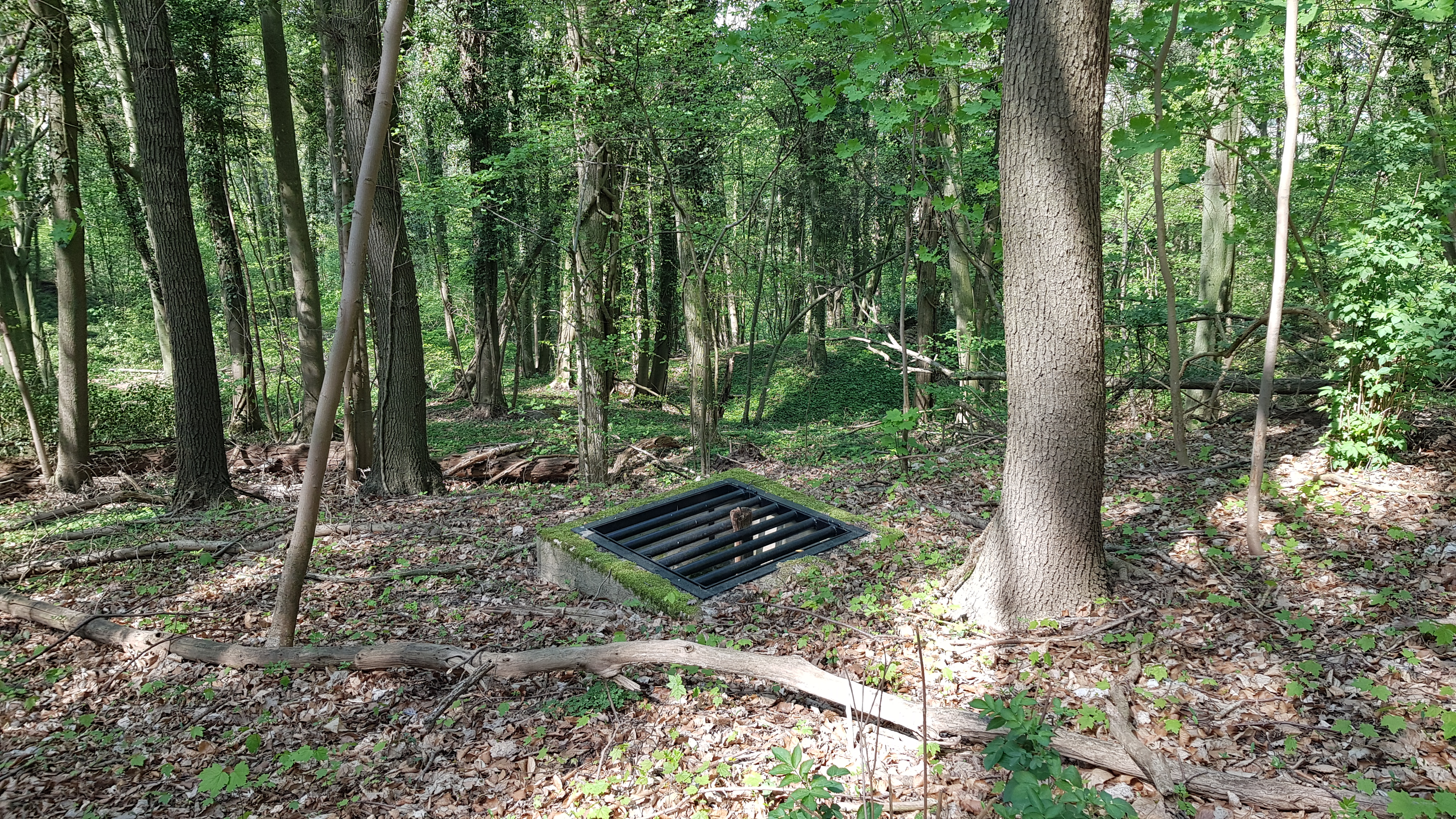 Groeve op de Trichterberg I, Savelsbos, Gronsveld, Nederland